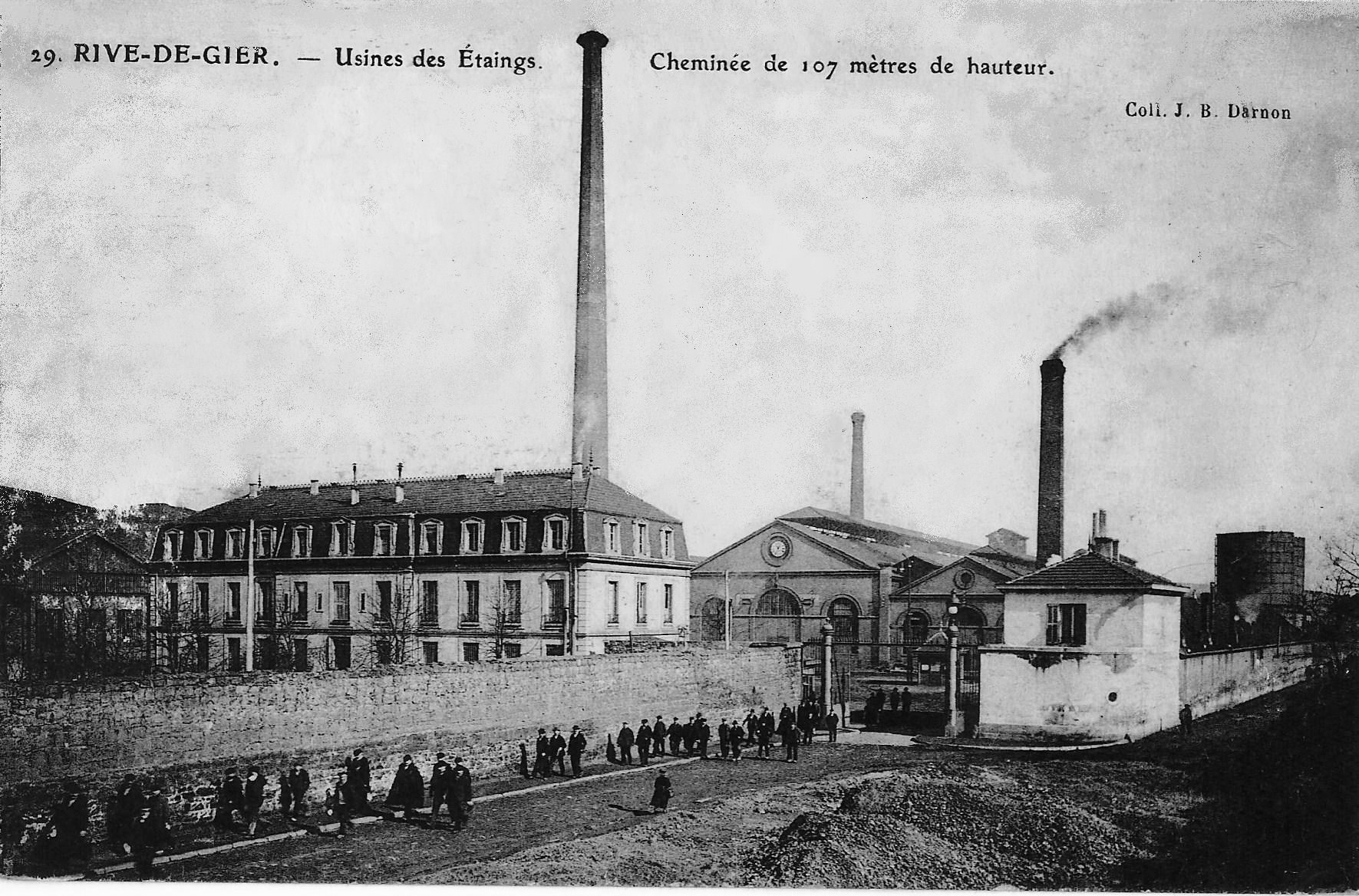 Châteauneuf. - Usines des Etaings. Cheminée de 107 mètres de hauteur.(Site de Châteauneuf).